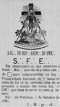 Parte do jornal "Província do Ceará" de 1881, edião 224, com anúncio da Loja Fraternidade Cearense.